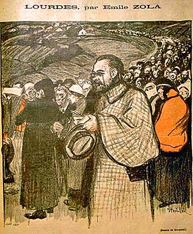 Dessin de Zola à Lourdes - ca 1899